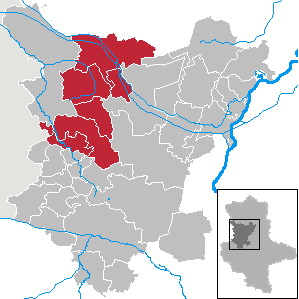 Verwaltungsgemeinschaft ("collective municipality") Flechtingen in Saxony-Anhalt (Country) - District (Landkreis) Börde